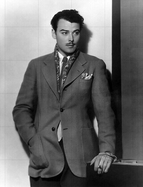 Photographie de l'acteur suédois Nils Asther à la fin des années 1920.